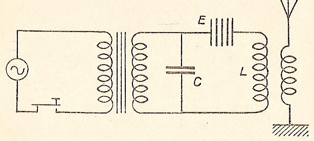 Principe de l'émetteur à ondes amorties à éclateur, utilisé au cours des deux premières décennies du 20e siècle. Le transformateur qui produisait la haute tension nécessitait un courant alternatif (CA)